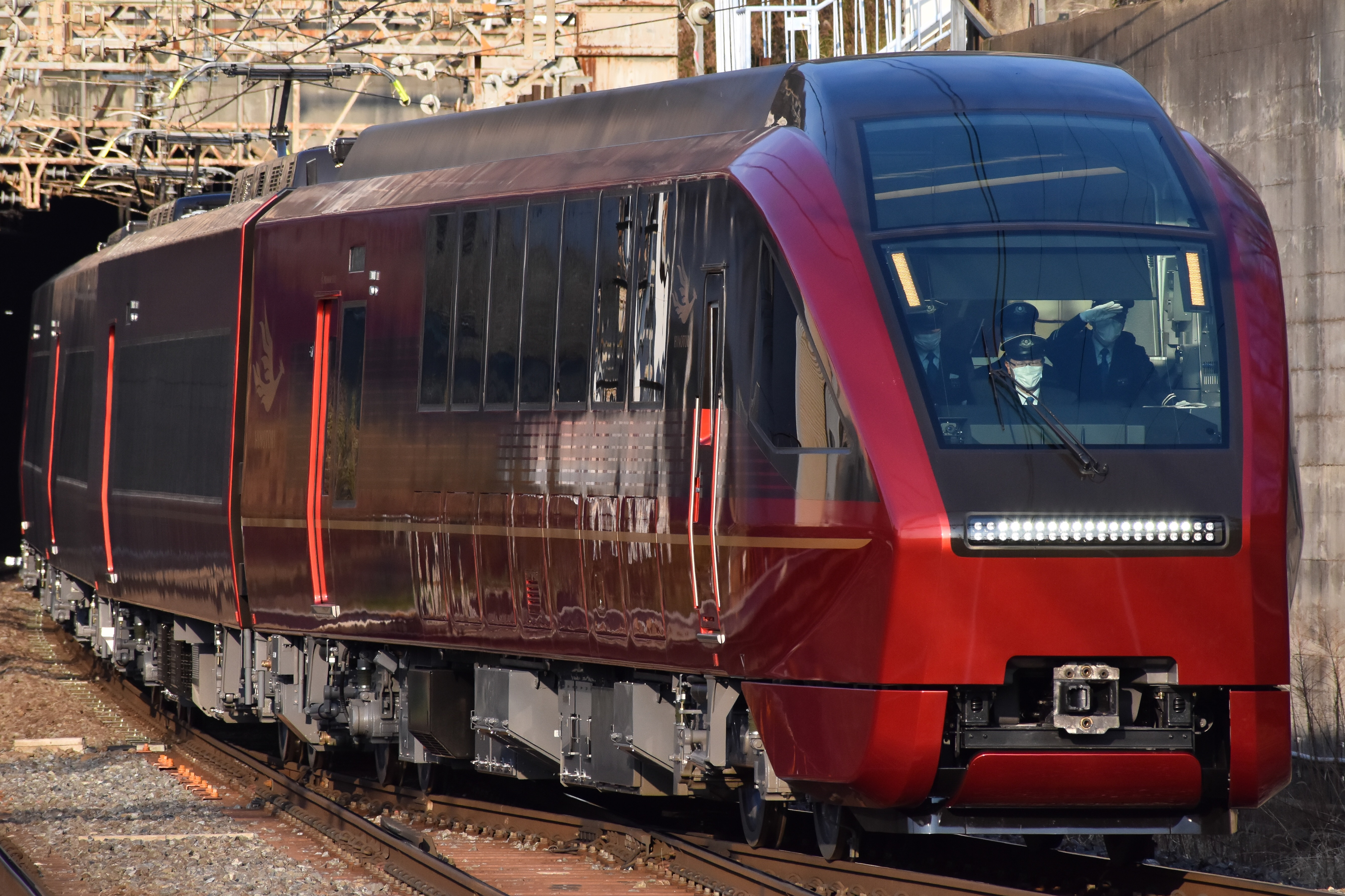 近鉄80000系 奈良線試運転 2020年2月2日撮影 生駒〜石切間